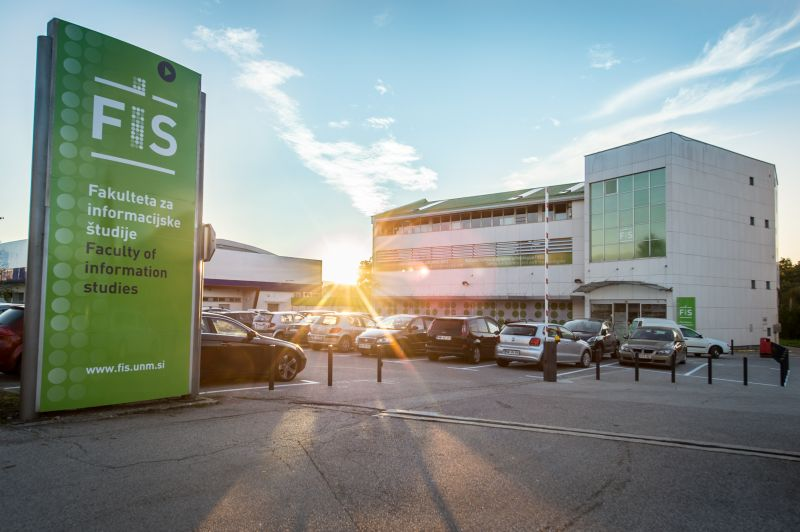 Fakulteta za informacijske študije v Novem mestu se od oktobra 2015 nahaja na novi lokaciji.